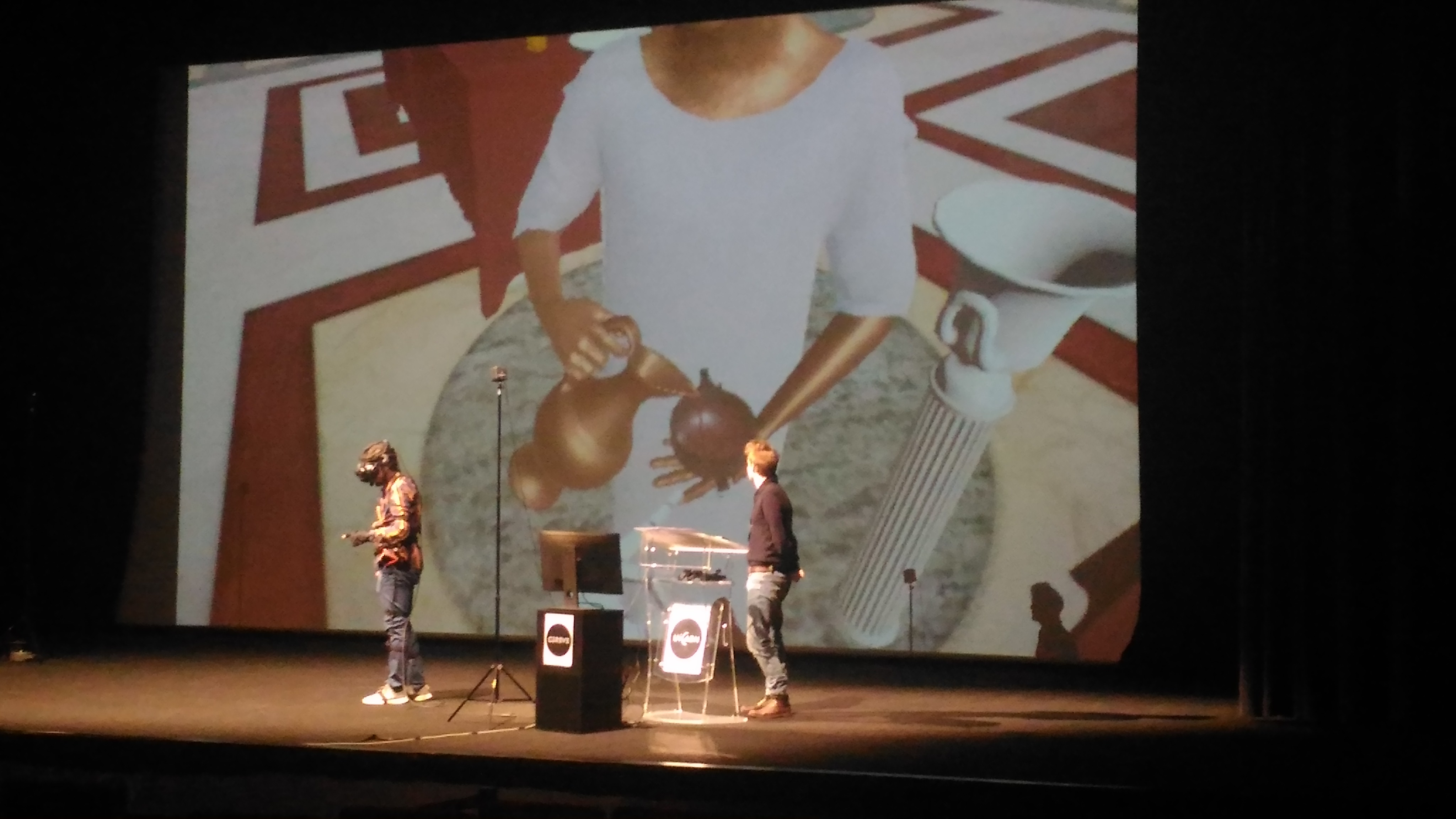 Nocturne du plan de Rome 4 avril 2018